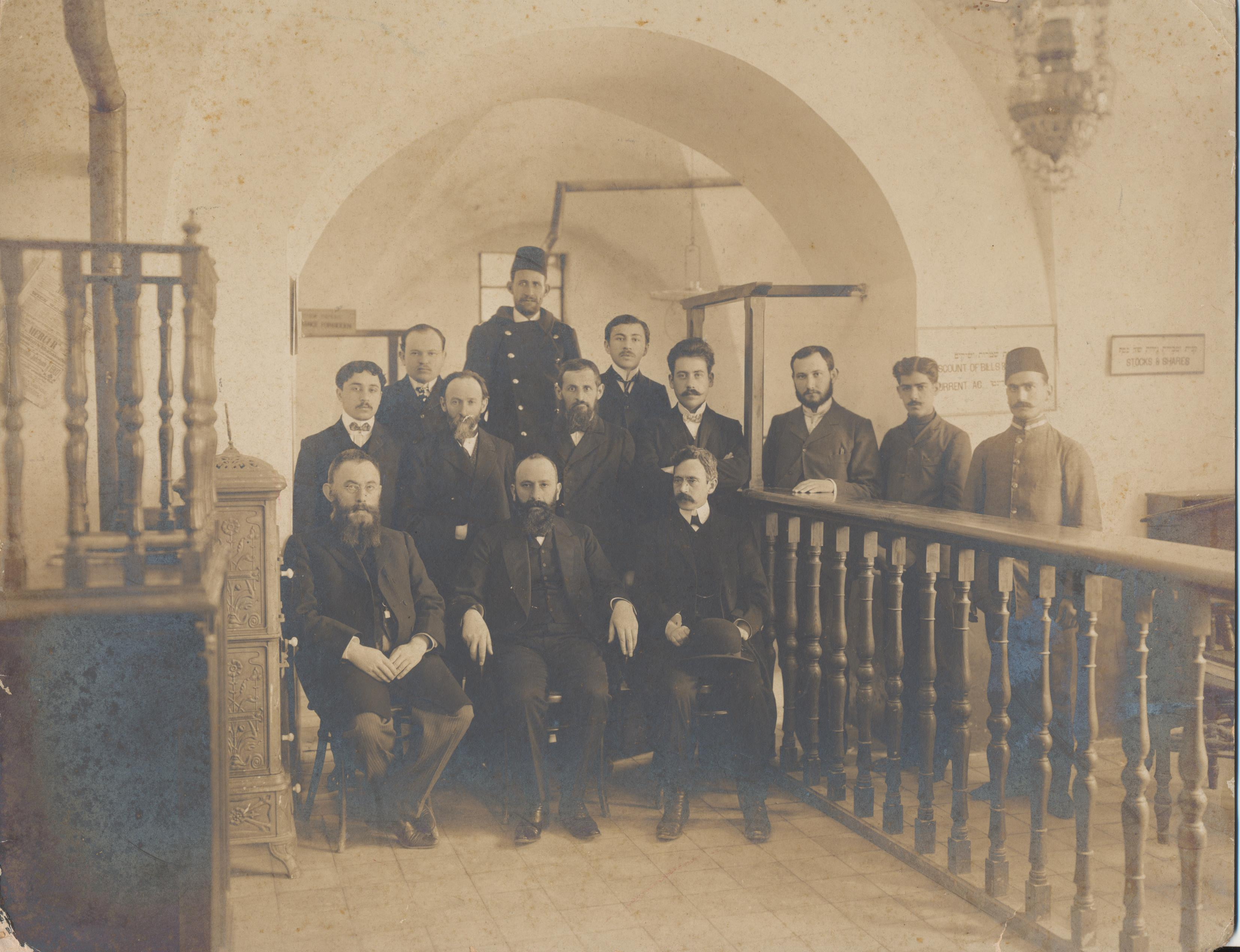 ביקור דוד וולפסון בבנק אפ"ק סניף ירושלים